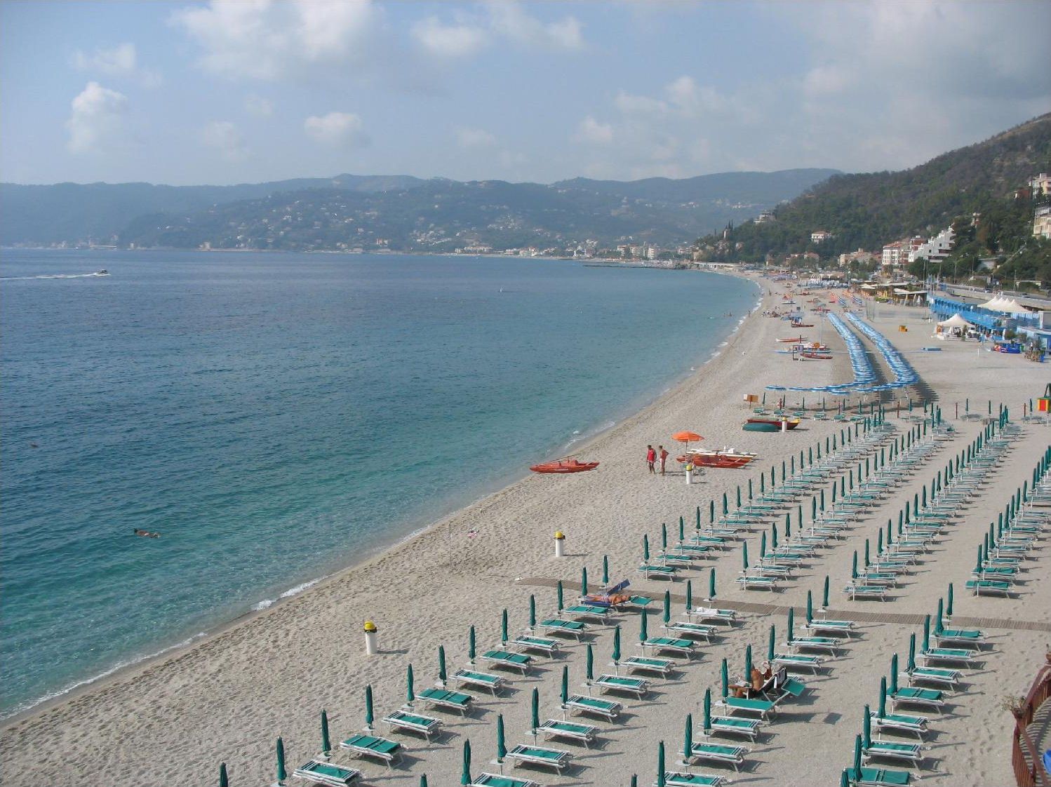 Bergeggi beach